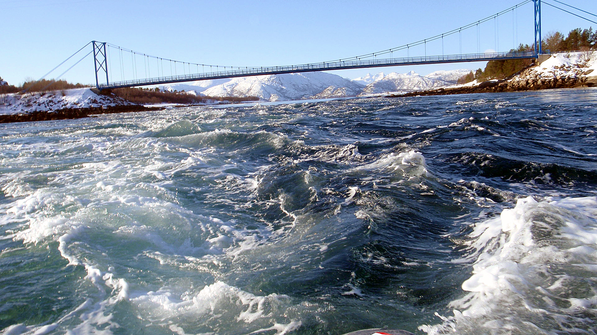 200 meter innafor bakken